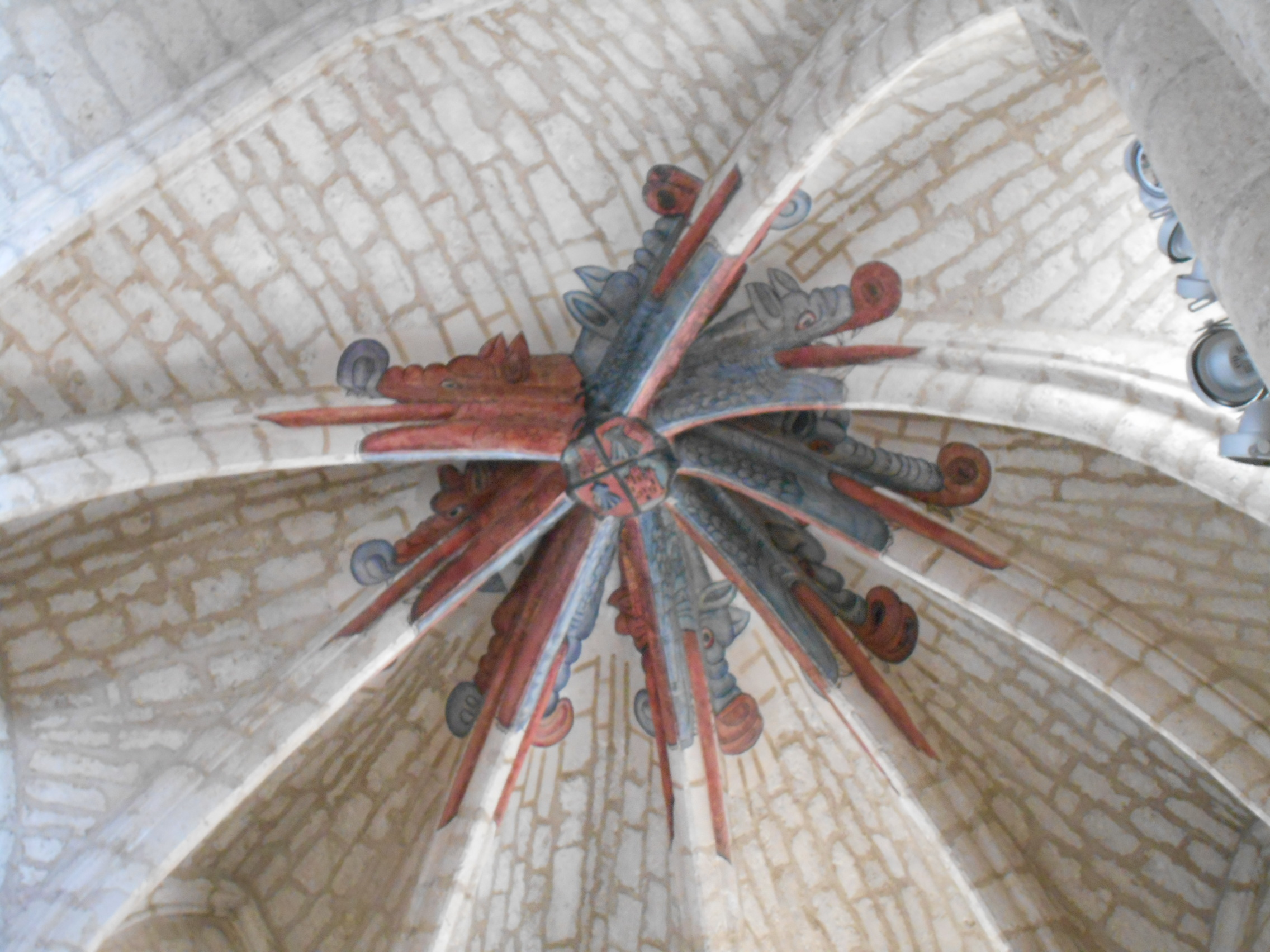 Fresco de ocho dragones en el ábside sobre el altar mayor. Iglesia de Santiago. Ciudad Real